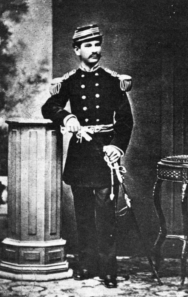 Coronel Alfonso Ugarte y Vernal (1847 - 1880), Jefe de la Octava División del Ejército del Sur en la Batalla de Arica.